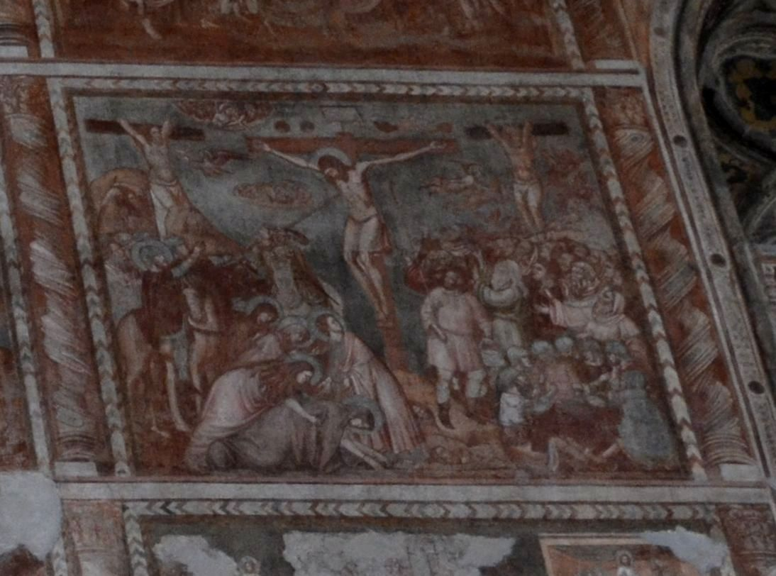 Chiesa di Santa Maria Donnaregina Vecchia (Napoli) - Coro delle monache: scena della Crocefissione